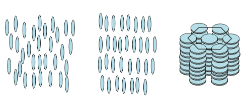 液晶の3種類の分類の図